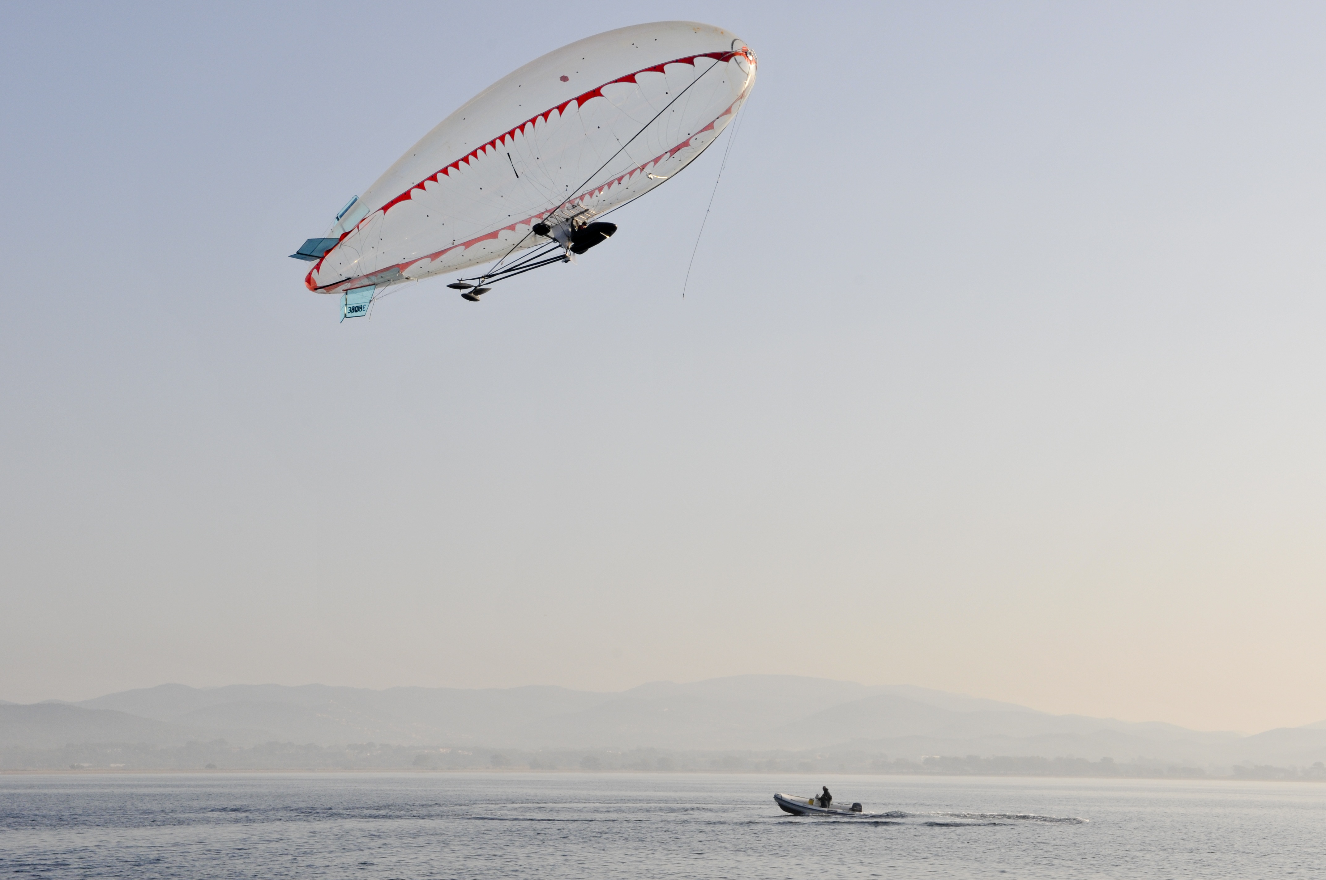 A-N400 évitement BAN Hyères